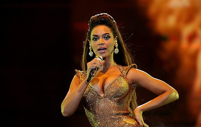 Beyonce durante el I am... Tour en Vancouver Canada